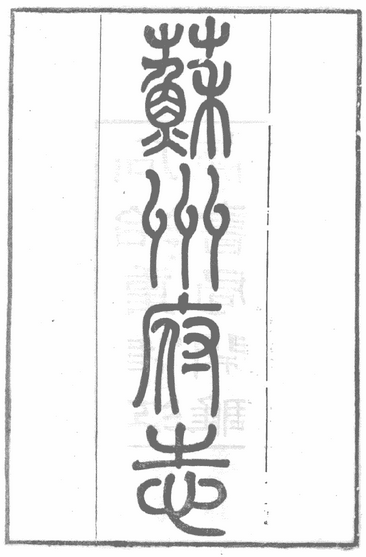 中文（中国大陆）: 同治苏州府志